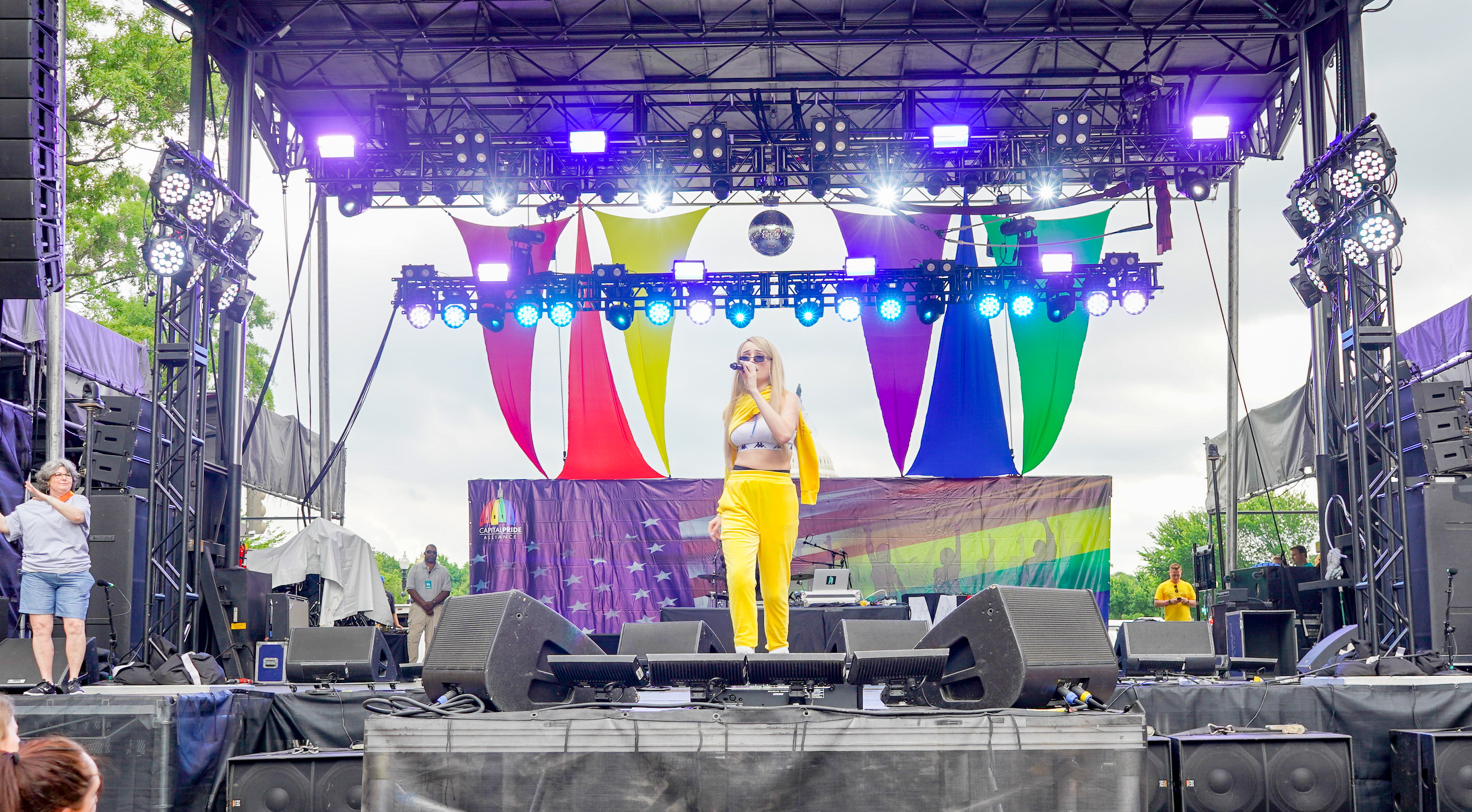 Kim Petras performs - Capital Pride concert 2018